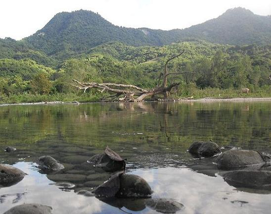 Rio Tecolotitla